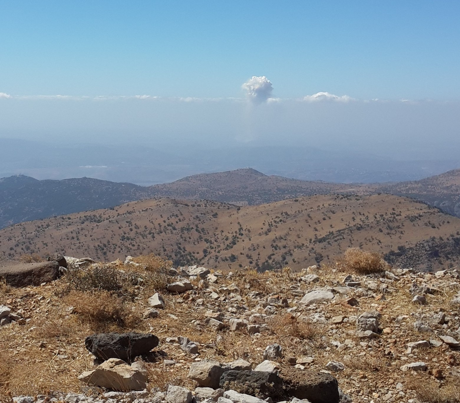 אינורסיה , צולם בחרמון 16-09-2013